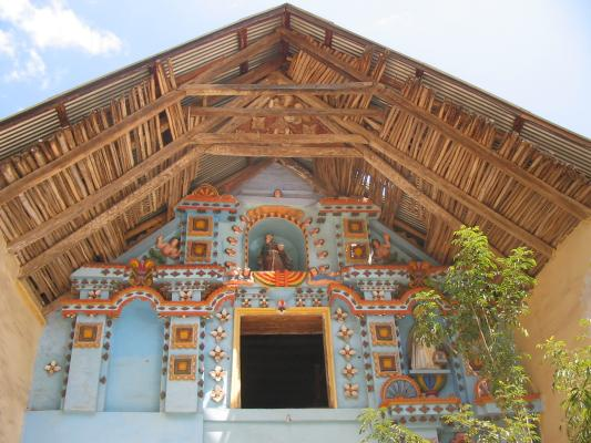 Iglesia del distrito de Mangas (Ancash, Peru).